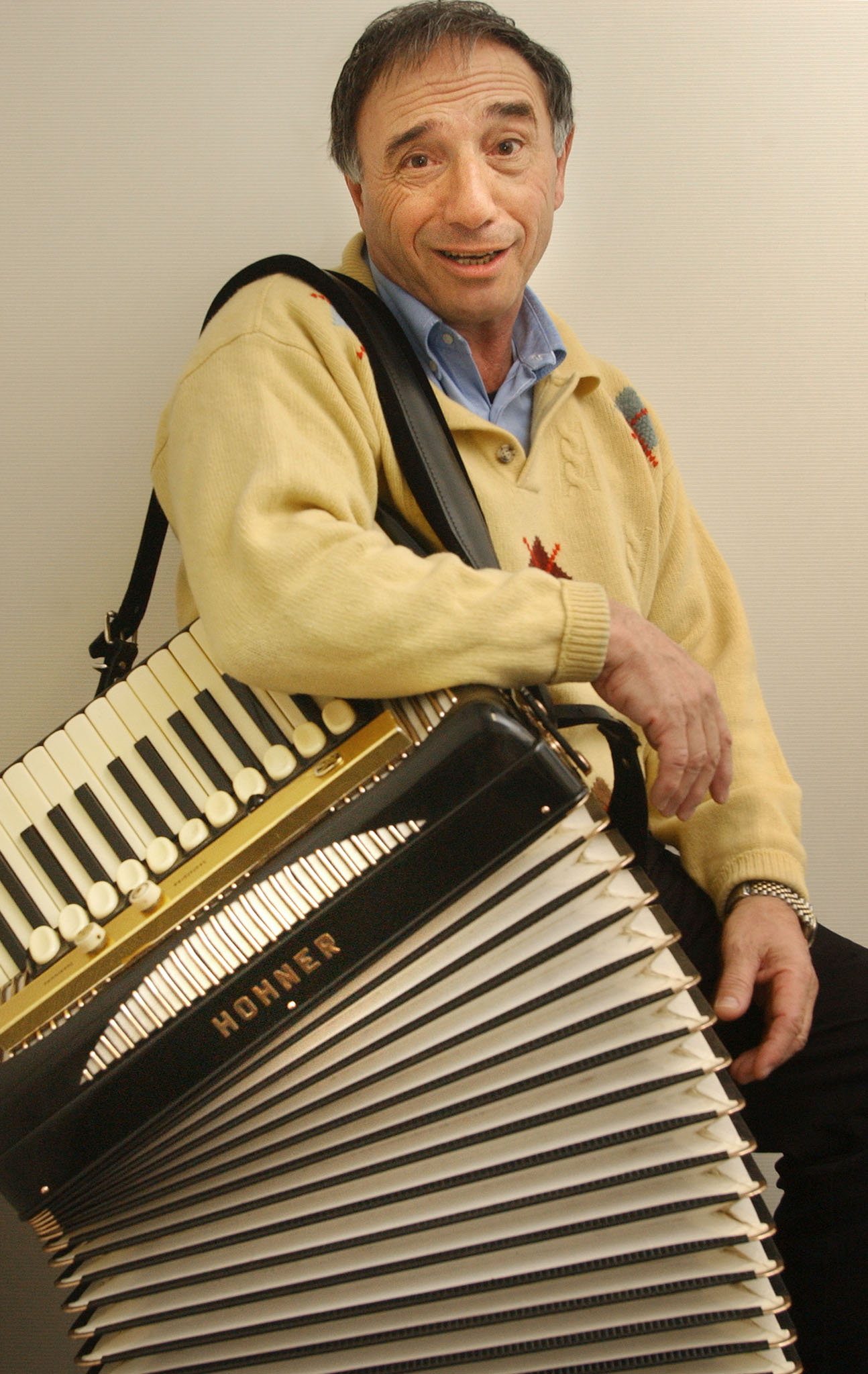 Rocco Granata, een in België wonende componist, muziekproducer en zanger.